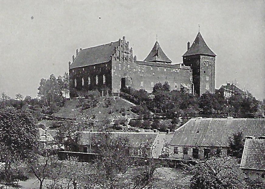 Deutschordensburg in Neidenburg